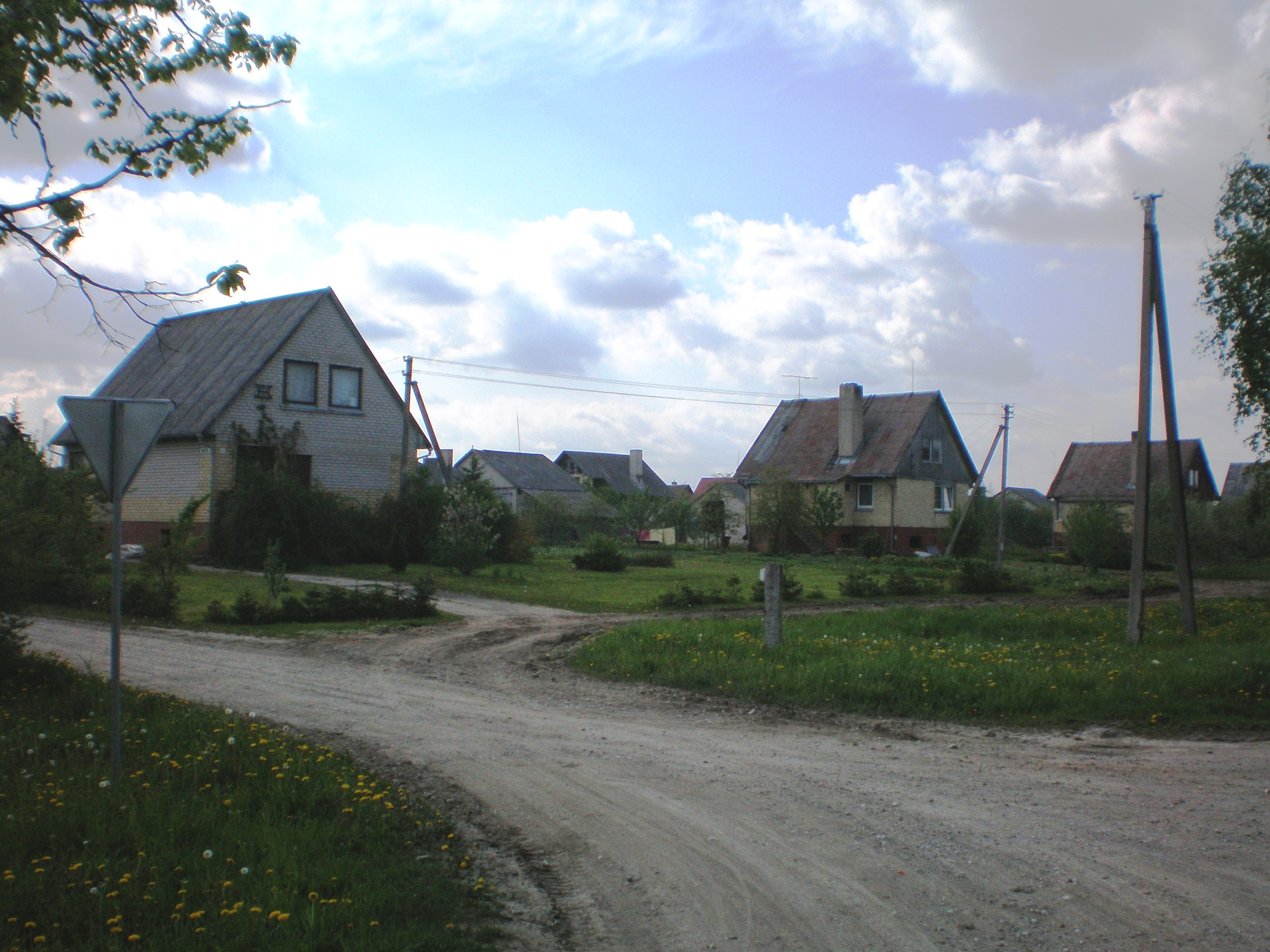 Keleriškiai